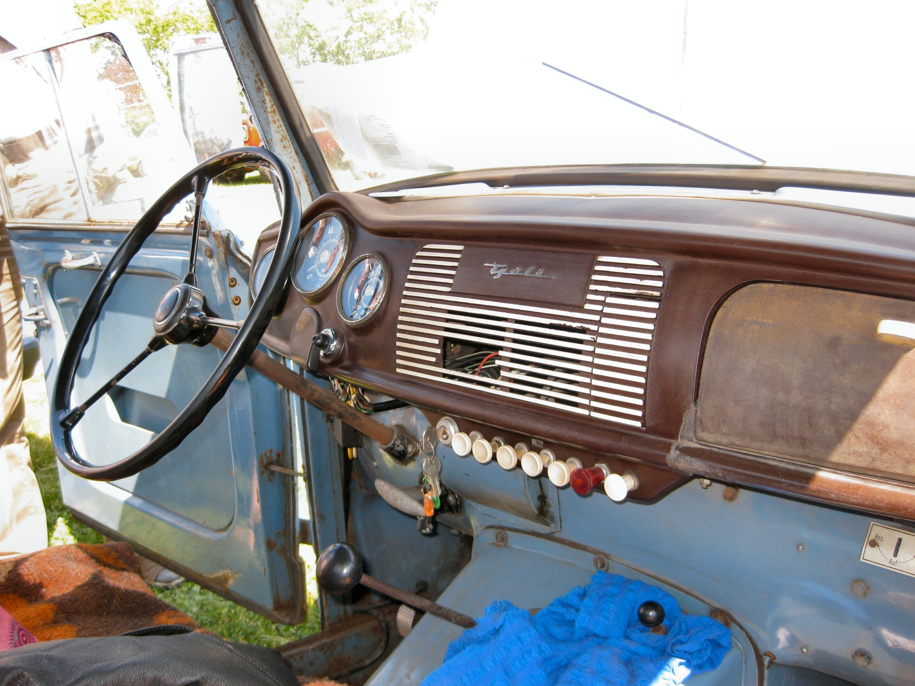 Goliath Goli Cockpitansicht